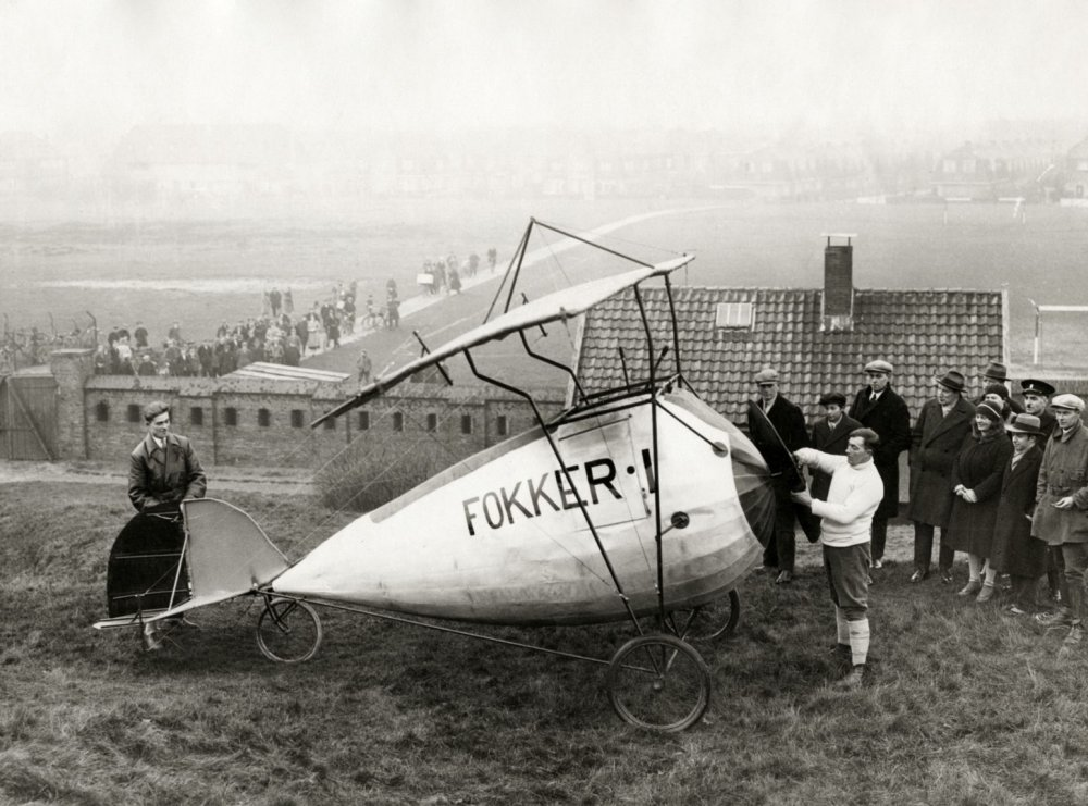 Een vliegfiets met propelleraandrijving, geconstrueerd door de gebroeders Fokker te Bussum, 1930.